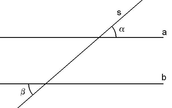 illustration d'un angle alterne-externe